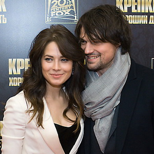 Юлия Снигирь и Данила Козловский на премьере фильма «Крепкий орешек: Хороший день, чтобы умереть» 7 апреля 2013 года